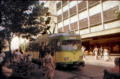 Albtalbahn-Wagen in der Karlsruher Fußgängerzone Kaiserstraße Foto: Mäfä Juli 1978